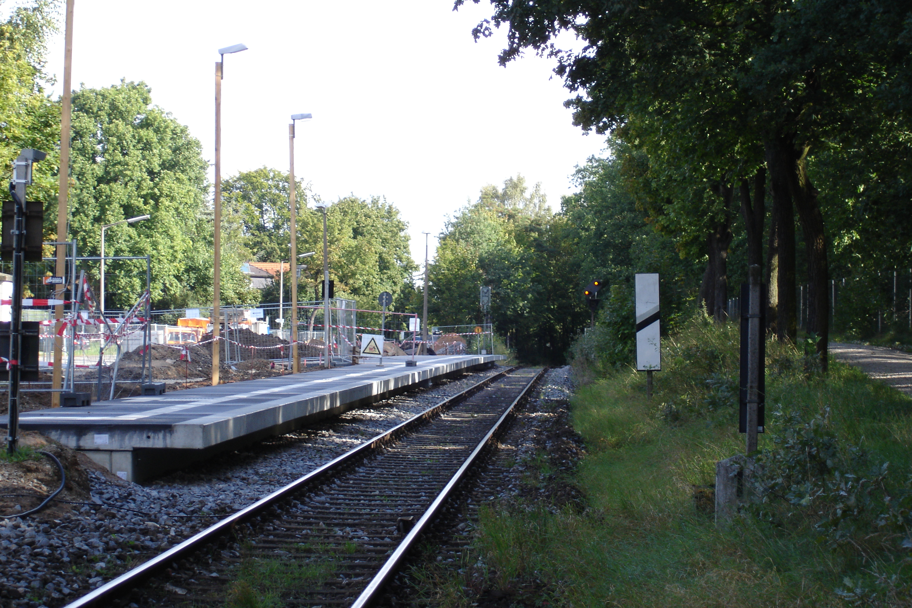 Haltepunkt Fürth-Westvorstadt in Blickrichtung Fürth (Bay) Hbf während Umbauarbeiten